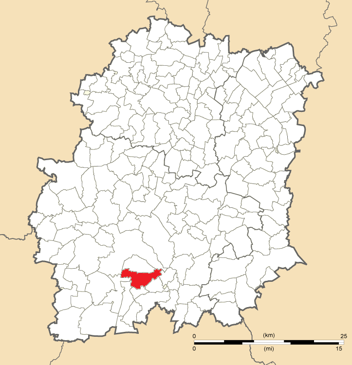 Carte de position de Boissy-la-Rivière en Essonne (91)